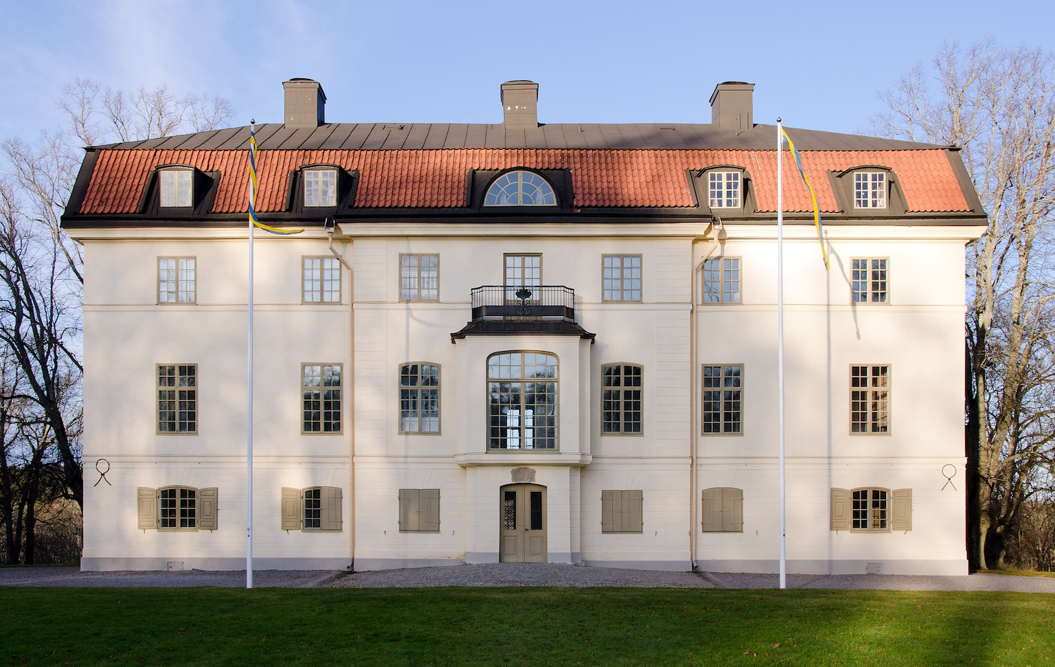 Framsidan av Granhammars slott, Upplands-Bro, Sverige.